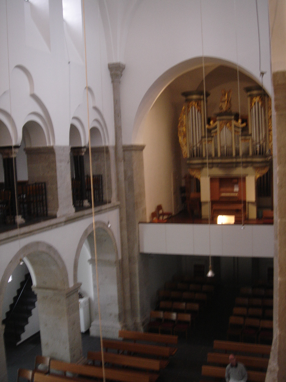 Reformationskirche Hilden, Innenaufnahme.